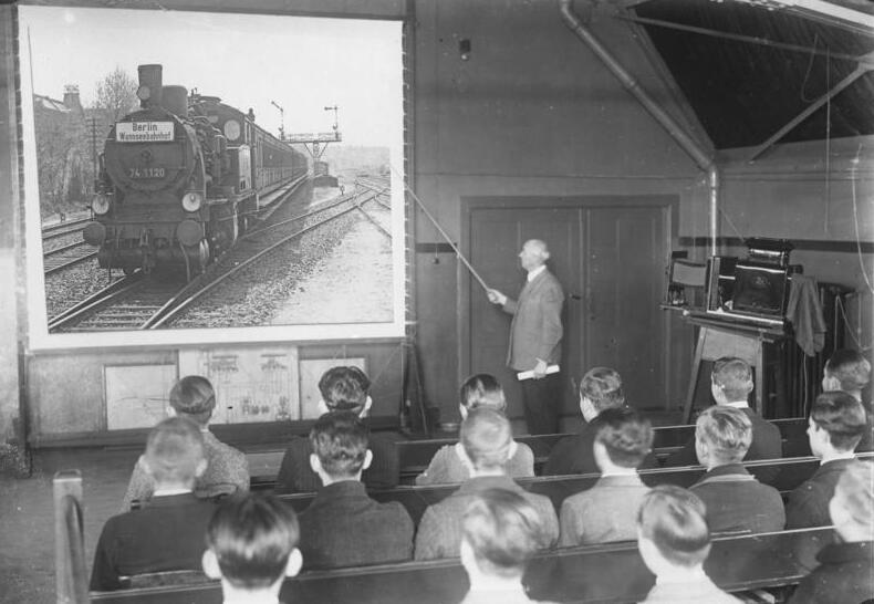 Aus der deutsche Reichsbahn-Central-Schule.Blick in den Unterrichtssaal der Eisenbahnschule während eines Vortrages.